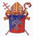 Brasão Oficial da Arquidiocese de Natal